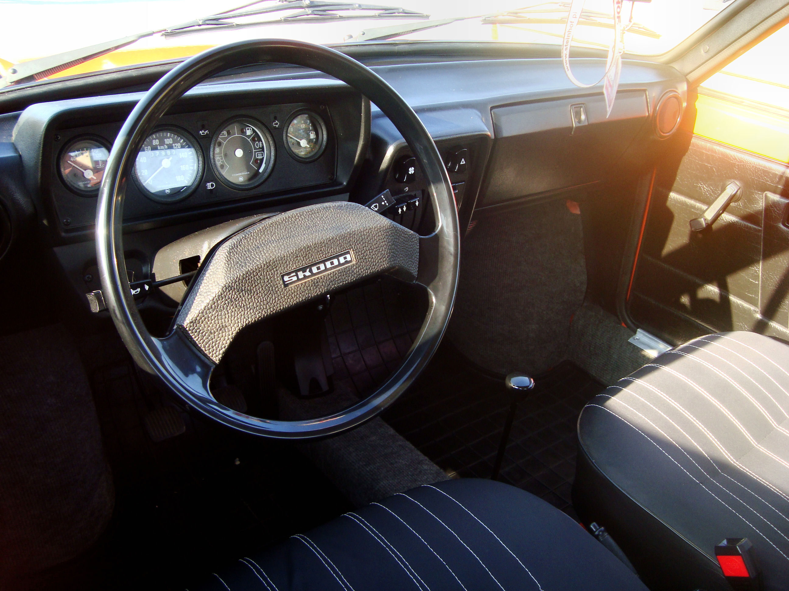 Deska rozdzielcza Skody 105L z 1982 roku.